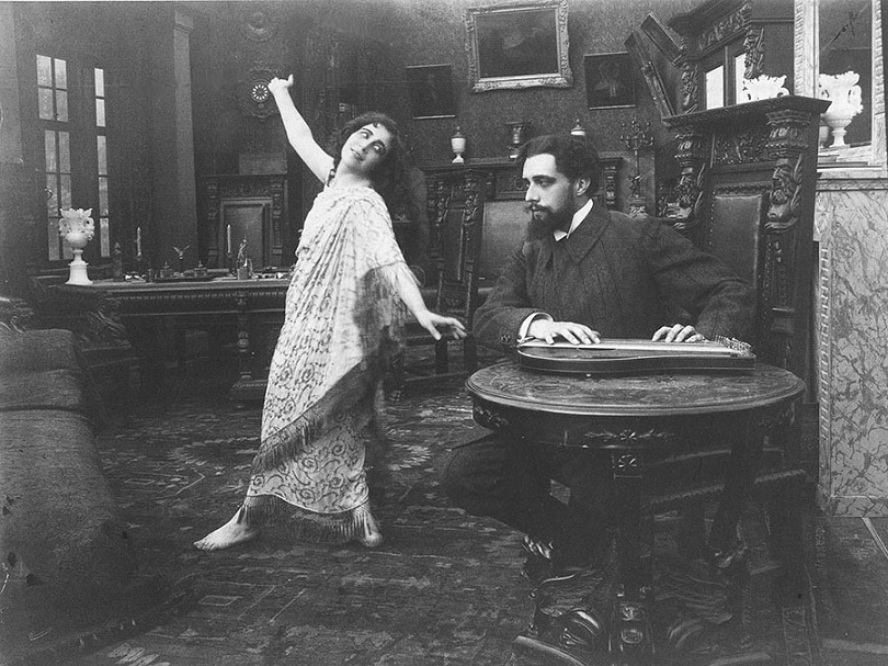 Scena del film "Le chiavi della felicità"